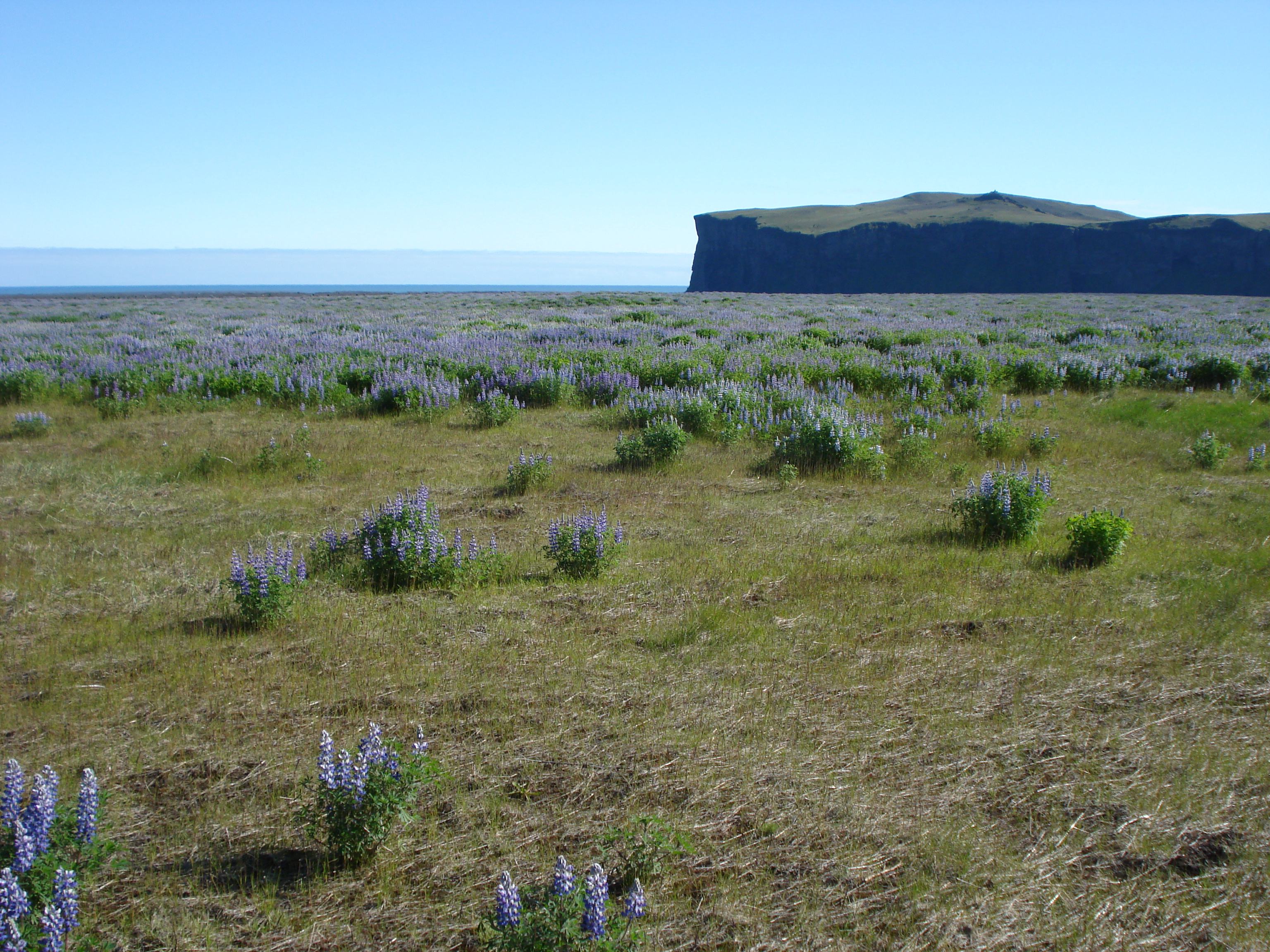 Hjörleifshöfði, Hjorleifshofdi in Iceland